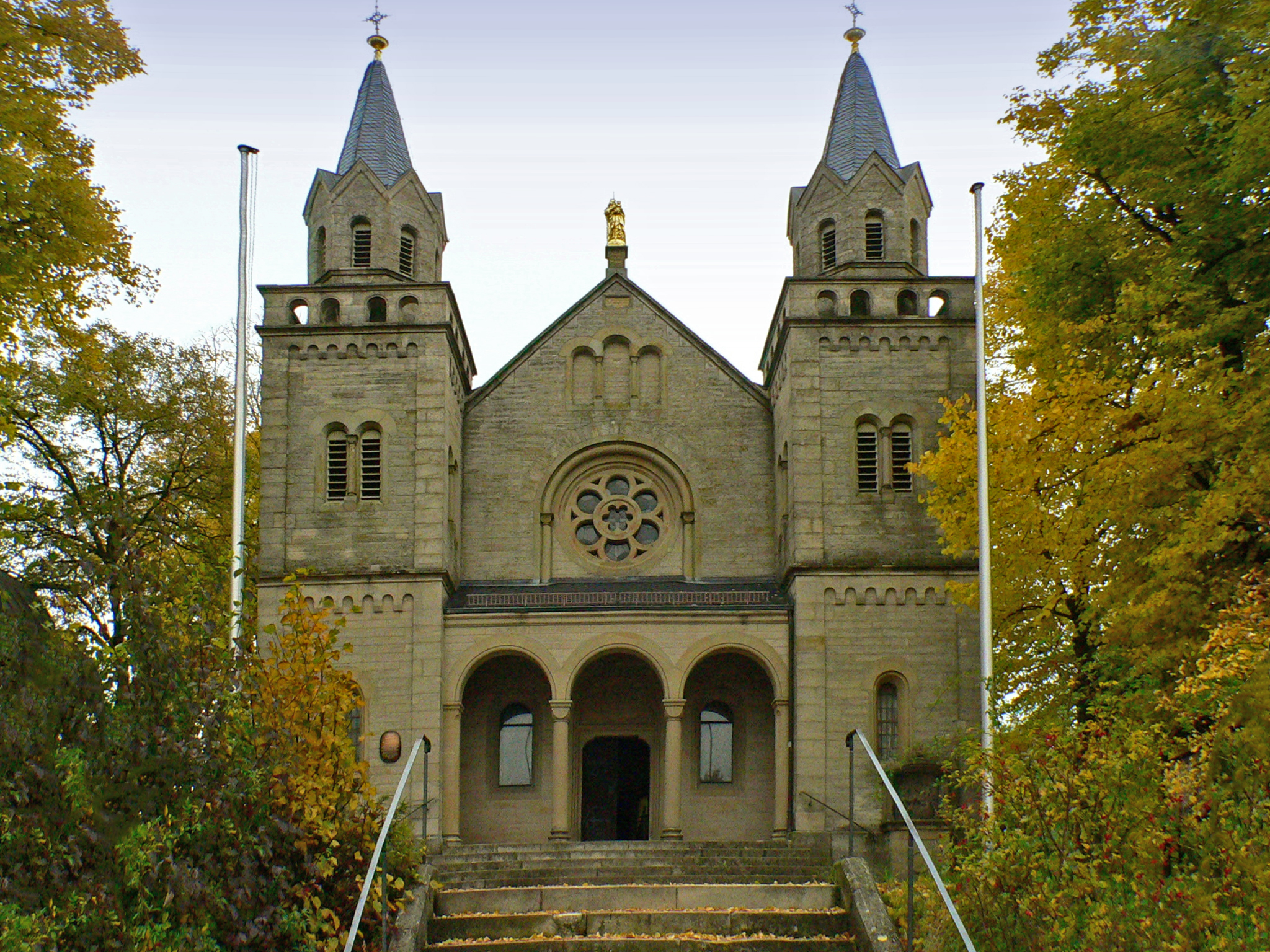 Zeil am Main (Bayern) - Marienkapelle, ehemalige Wallfahrtskirche